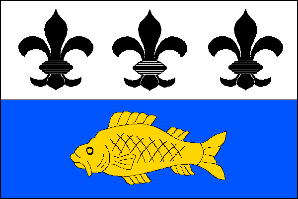 vlajka, Řepice, okres Strakonice